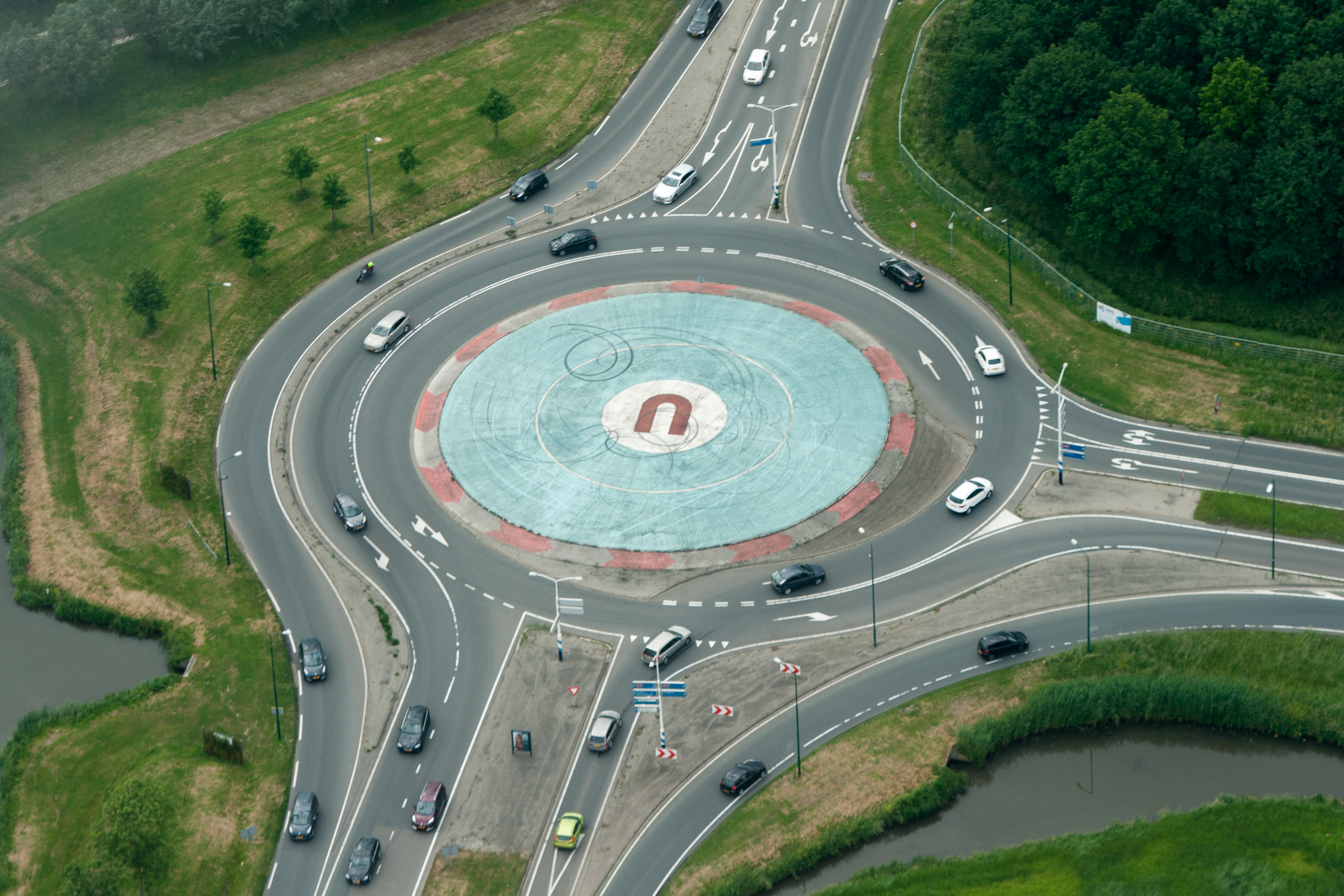 NG-T-120.jpg